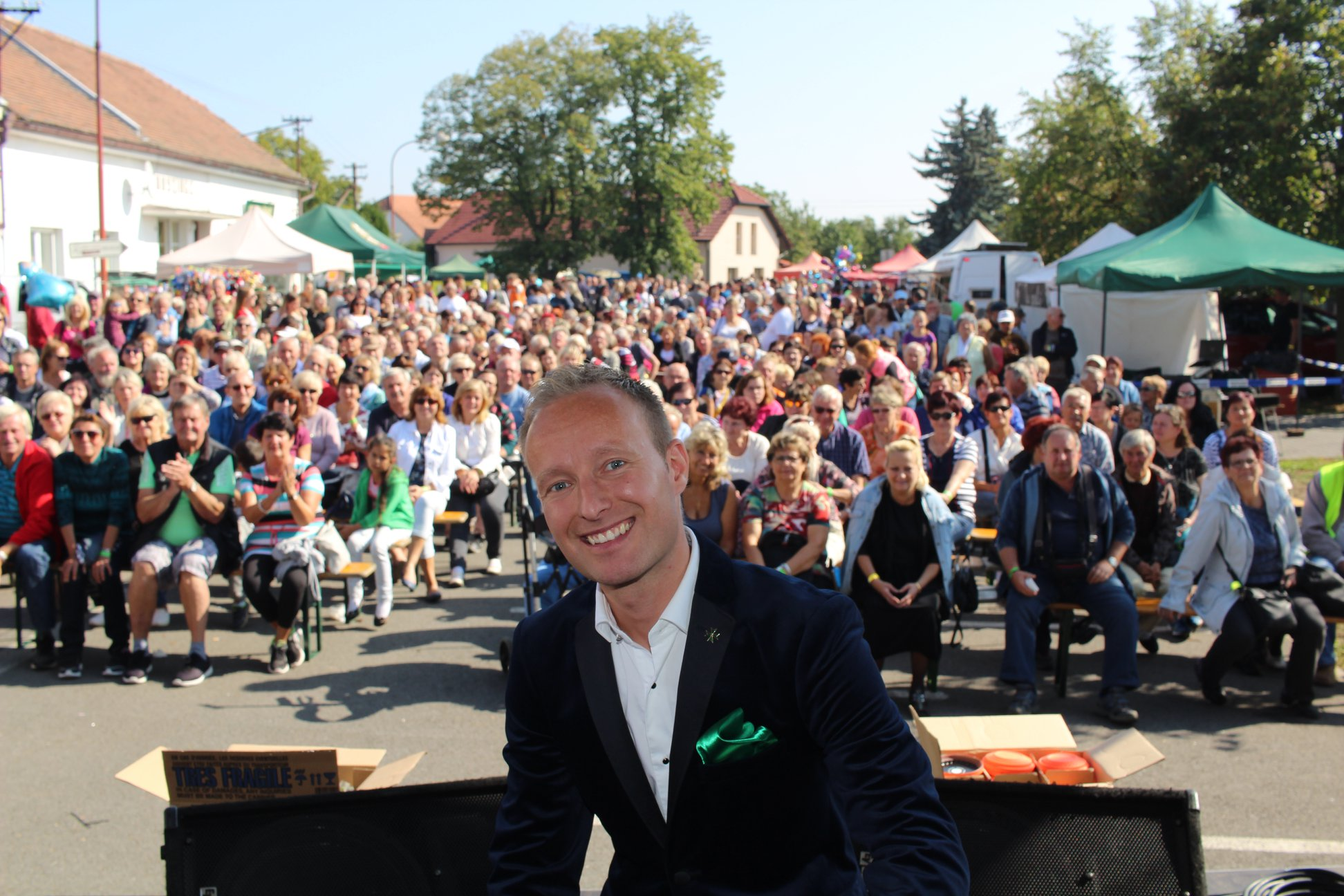 Nathaniel Filip po vystoupení na Pohřebačském jarmarku.